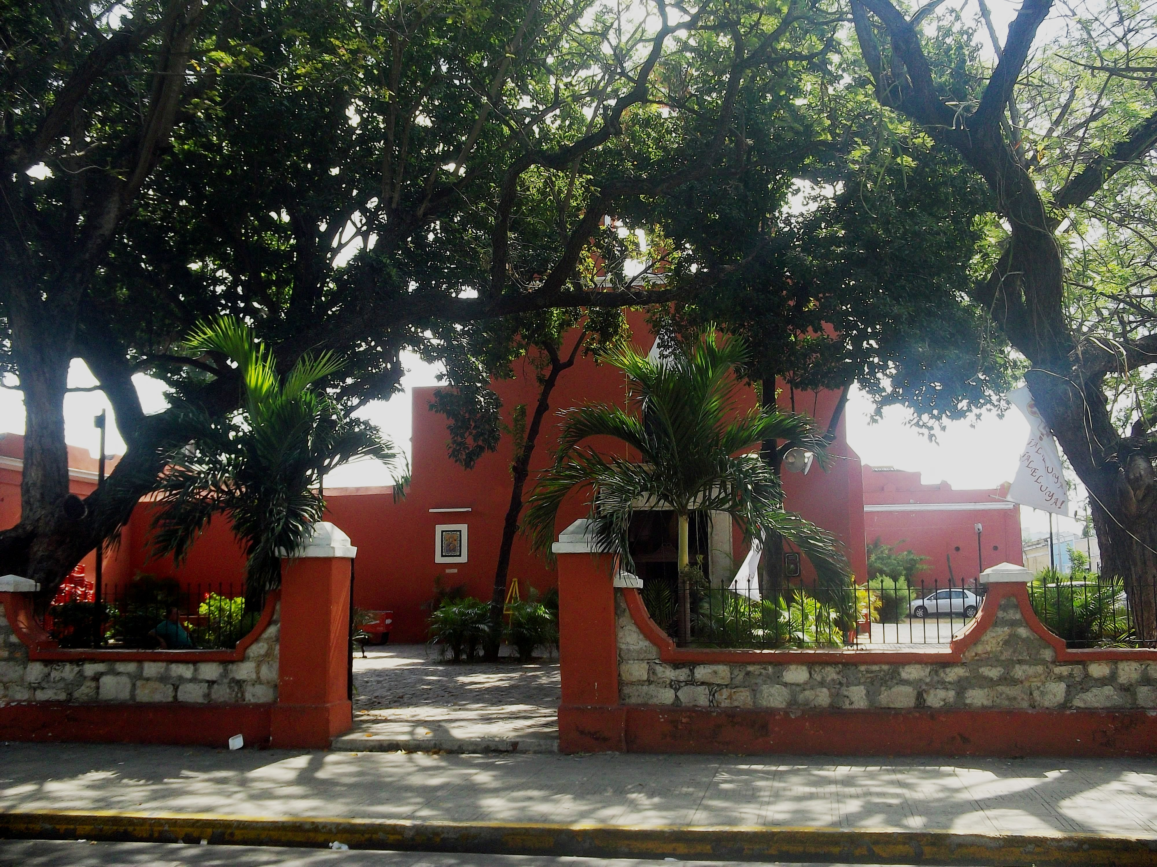 Iglesia de la 3ª Orden, Mérida, Yucatán.